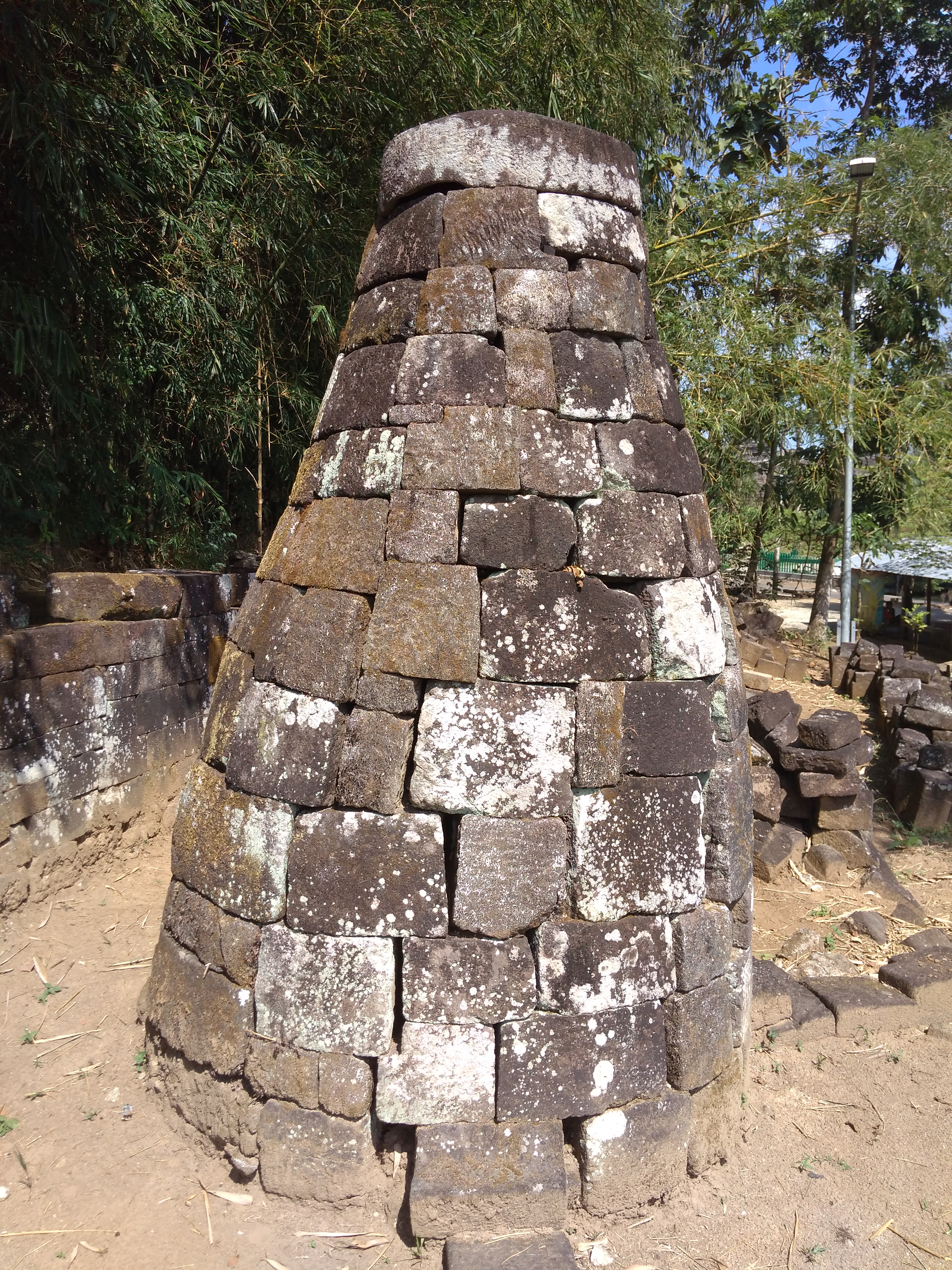 Reruntuhan Candi Dawangsari